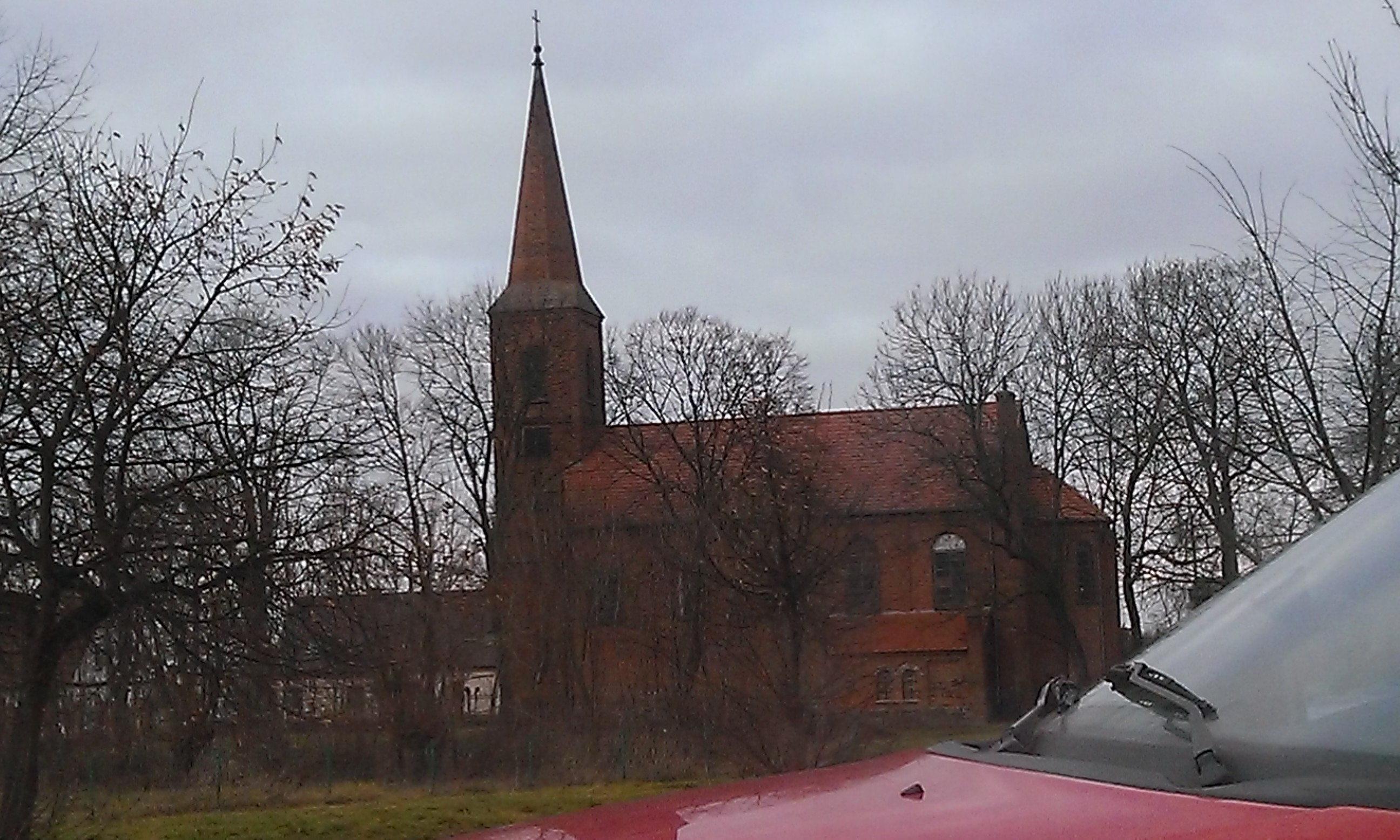 Duszniki Wielkopolskie kościół poewangelicki